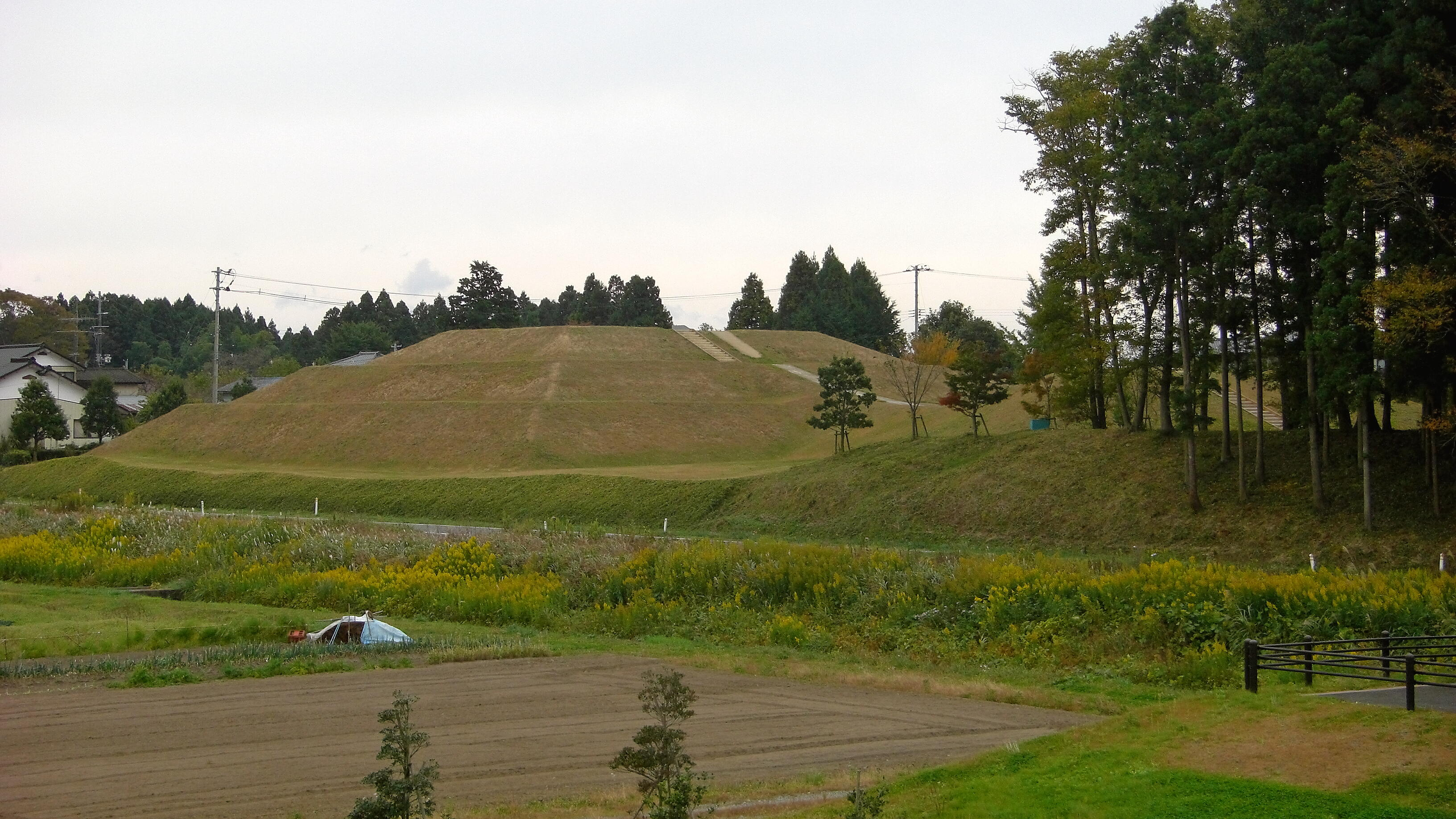 桜井古墳